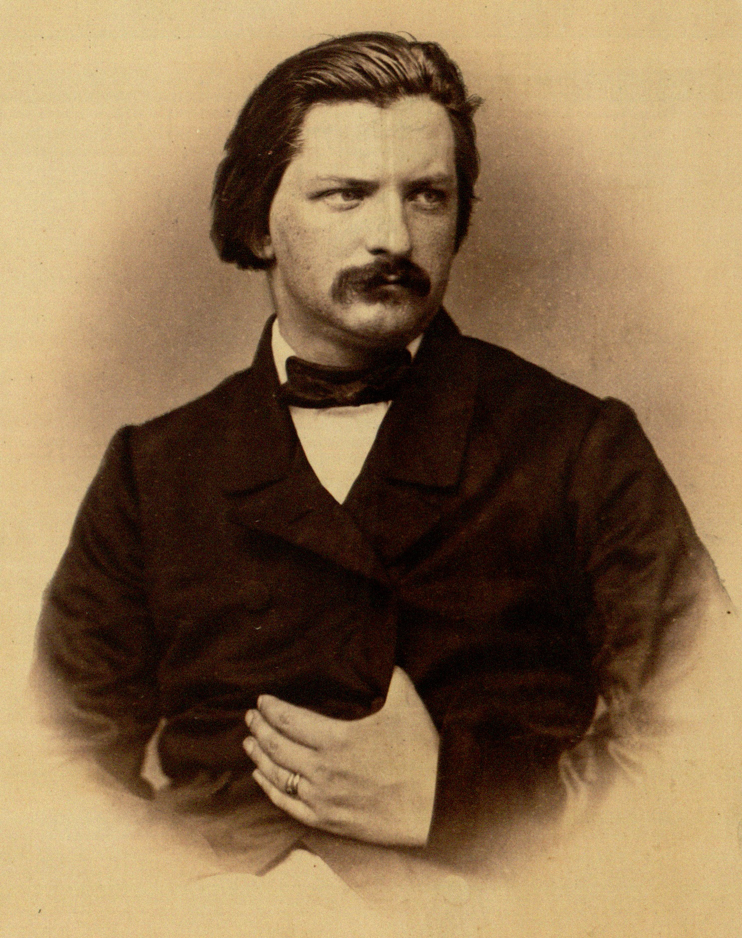 Carl Otto Weber, Arzt, 1865–1867 Professor für Chirurgie in Heidelberg